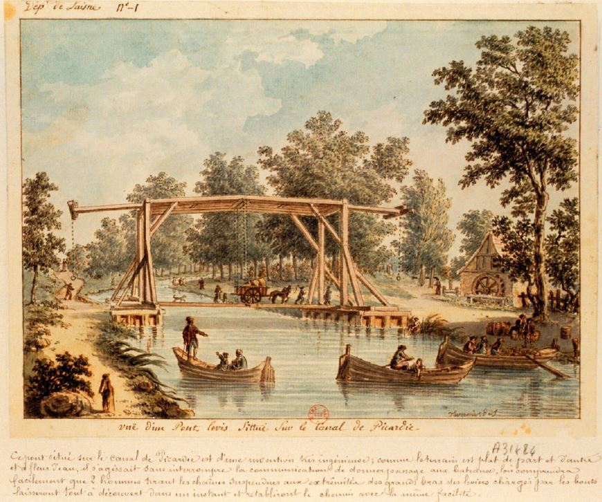 Titre : Vuë d'un Pont levis sittué [sic] sur le canal de Picardie : [dessin] / Tavernier de J. [Jonquières] Auteur : Tavernier de Jonquières (17..-17.. ; dessinateur). Dessinateur Date d'édition : 178. Sujet : Ponts mobiles Sujet : Barques Sujet : Moulins à eau Sujet : Picardie, Canal de Type : Paysages -- 18e siècle Format : Dessin à la plume et encre brune, aquarelle ; 17,5 x 24,3 cm Description : Collectionneur : Destailleur, Hippolyte (1822-1893) Description : Référence bibliographique : Destailleur Province, t. 5, 1278 Droits : domaine public Identifiant : ark:/12148/btv1b7741280q Source : Bibliothèque nationale de France, département Estampes et photographie, EST RESERVE VE-26 (J) Relation